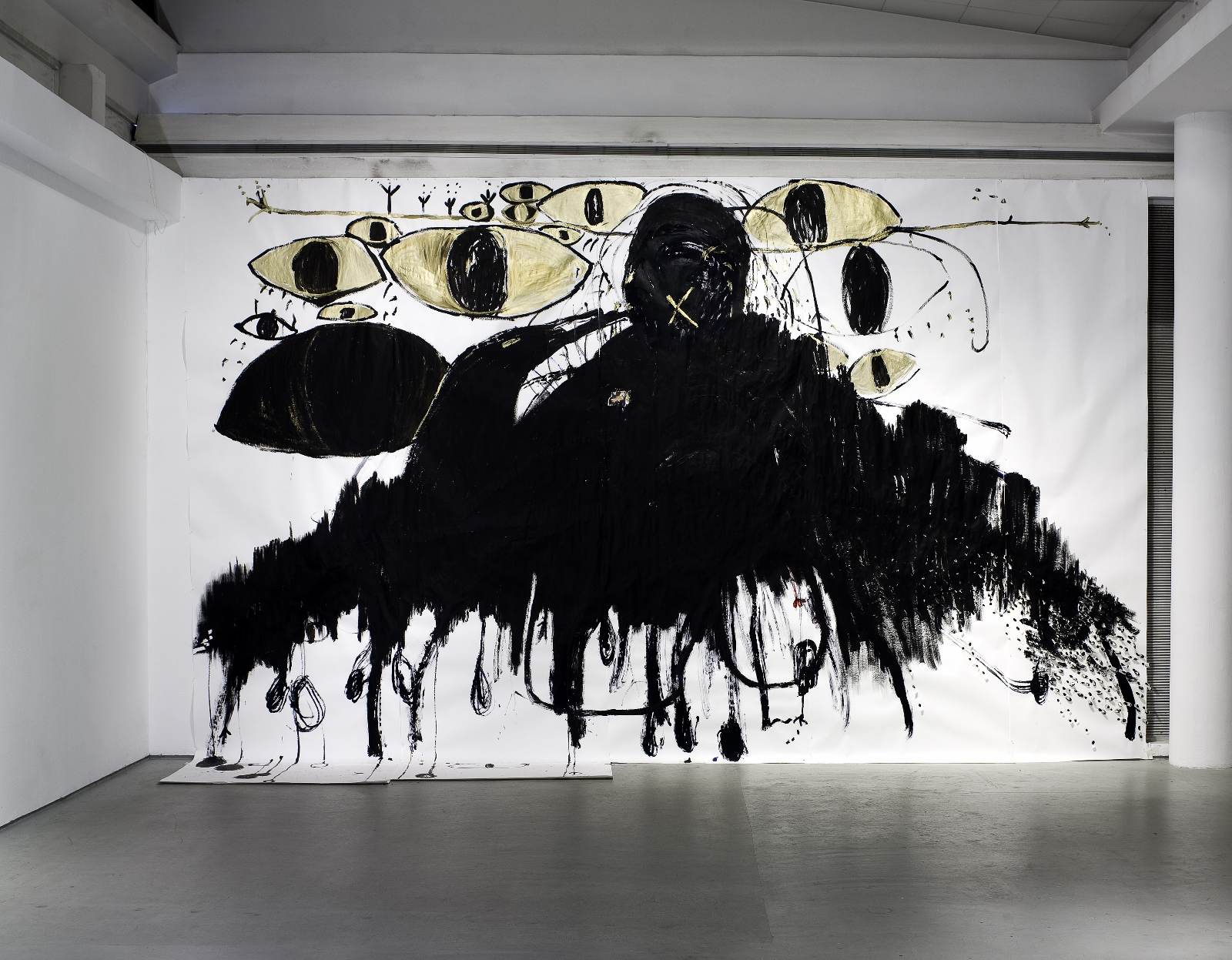 העלמה והעורב